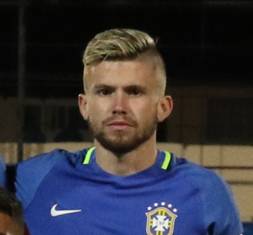 Riobamba, Ecuador, 18 enero 2017 (Andes).- El combinado ecuatoriano dirigido por Javier Rodríguez cayó 1-0 este miércoles ante Brasil en el marco de la primera jornada del Grupo A del Campeonato Sudamericano Sub 20 Ecuador 2017, durante el partido jugado en el estadio Olímpico de Riobamba (centro andino), abarrotado de hinchas. ANDES/Micaela Ayala V.